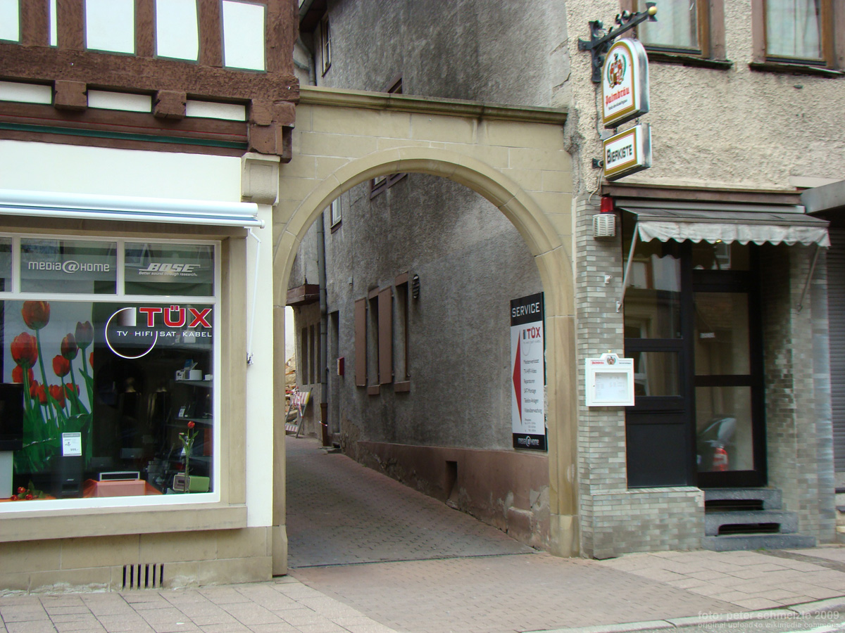 Historisches Tor Brettener Straße 8-10 in Eppingen